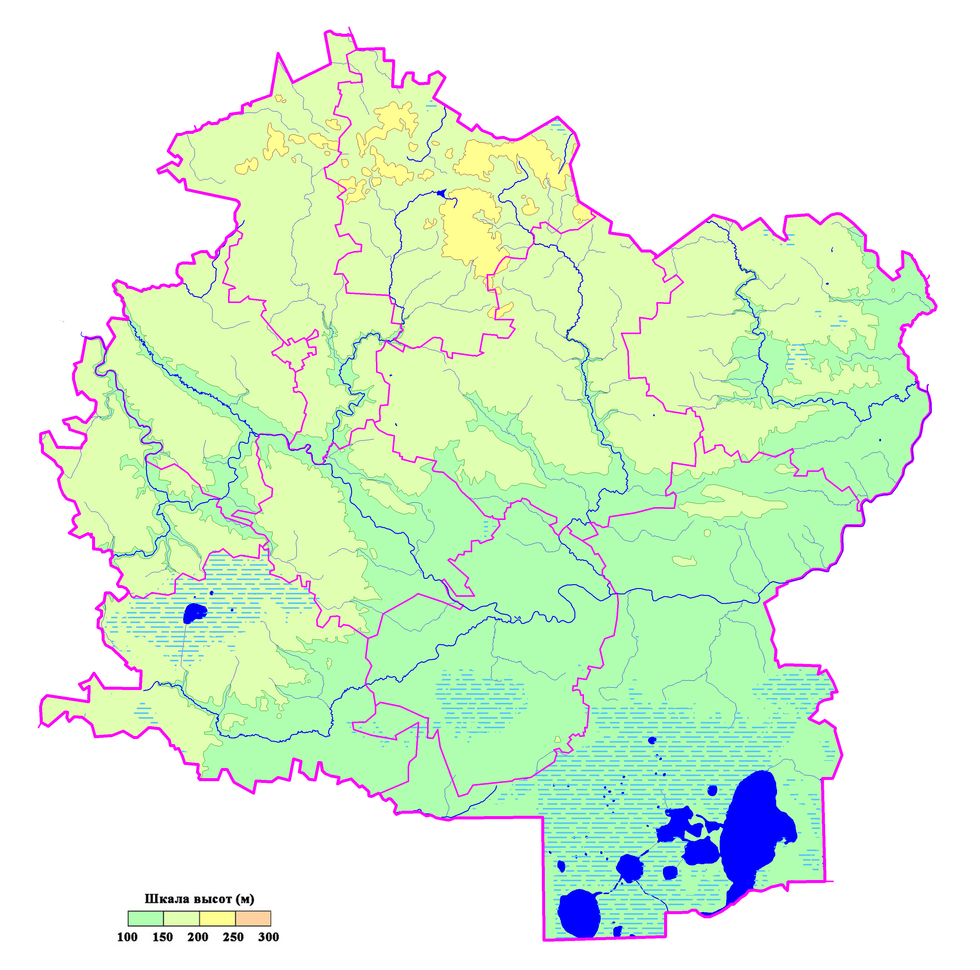 Физическая карта Рамешковского района Тверской области